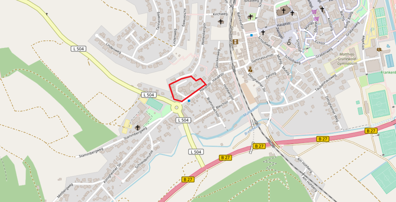 Lage des Wohnparks Zipf (ehemalige Brauerei Zipf) und des naheliegenden Zipf-Kreisels in Tauberbischofsheim. Das ehemalige Brauereiareal (heutiger Wohnpark) ist auf dem Bild rot markiert.